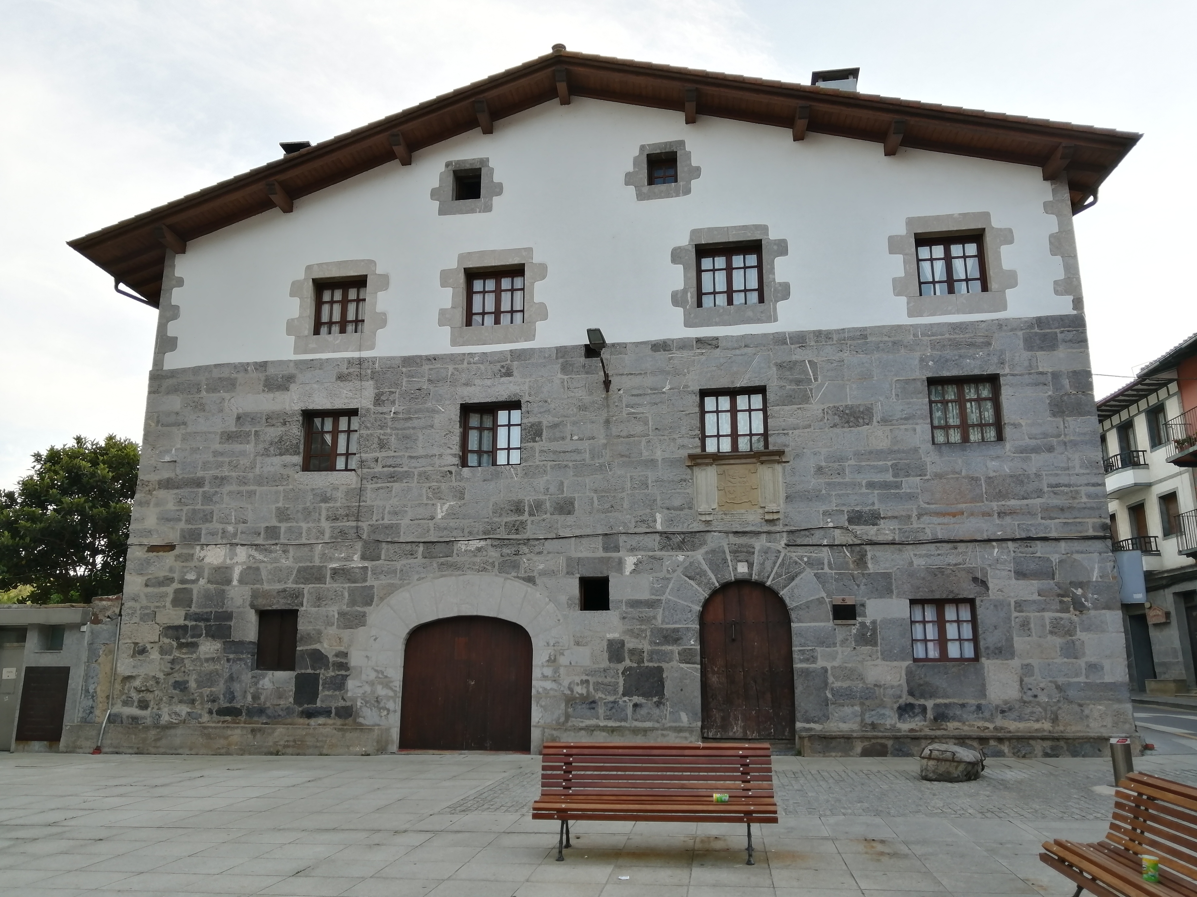 Ibañez Aldekoa Jauregia, Aulesti